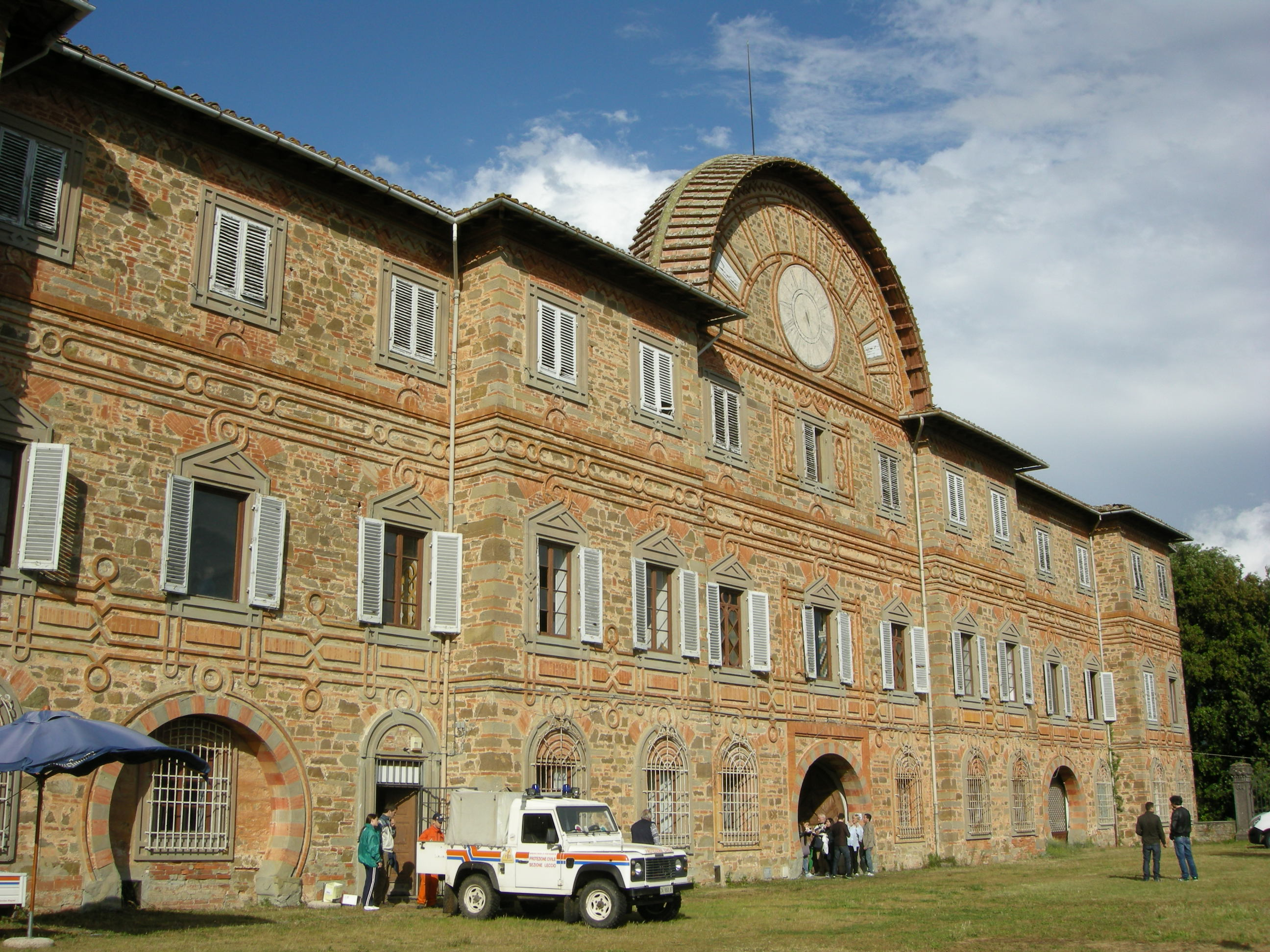 Sammezzano, facciata retro